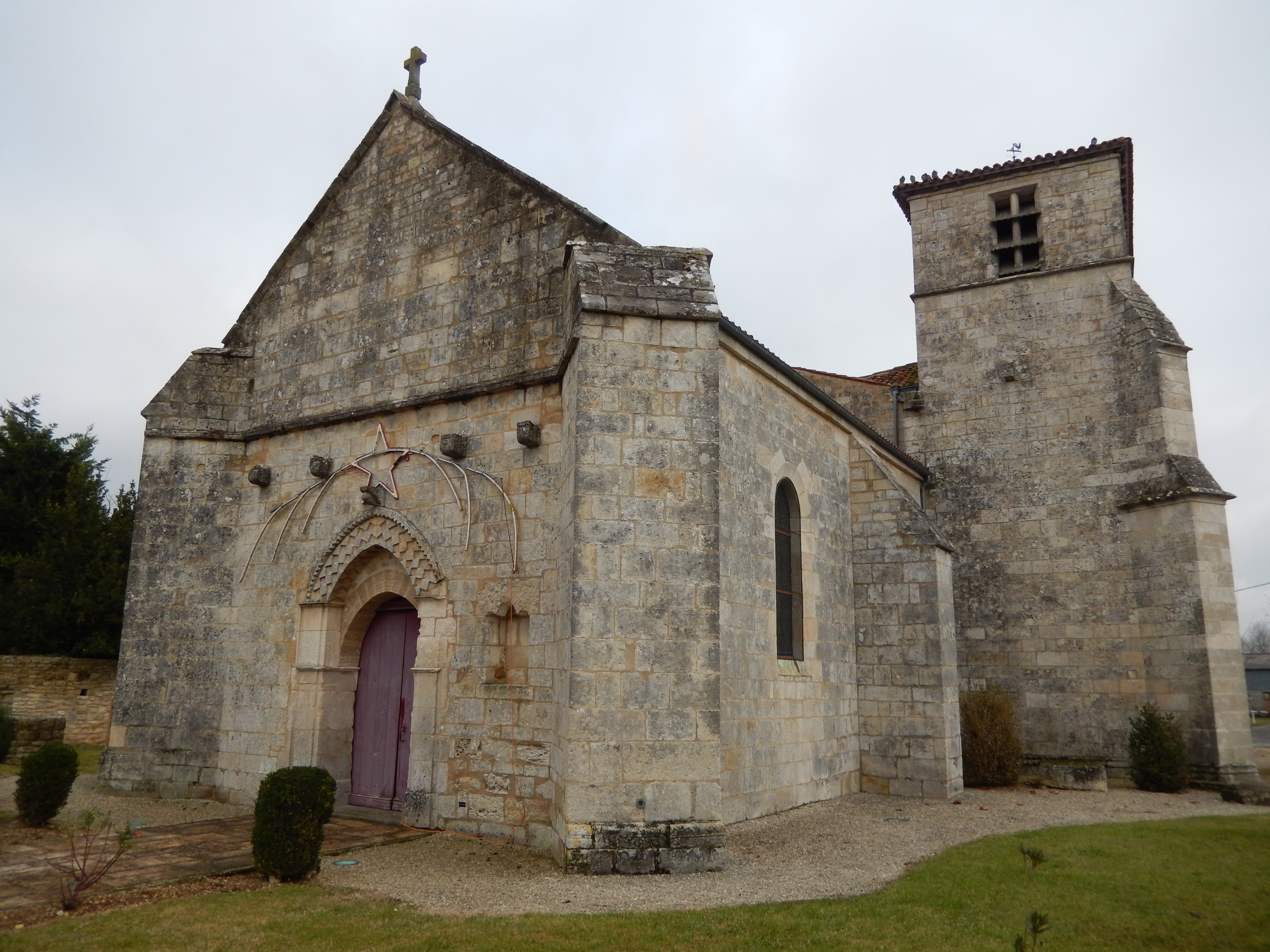 L'église Saint-Pierre dans la commune d'Aumagne, en Charente-Maritime.